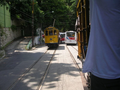 calle Almirante Alexandrino, barrio Santa Teresa, Rio de Janeiro, Brasil